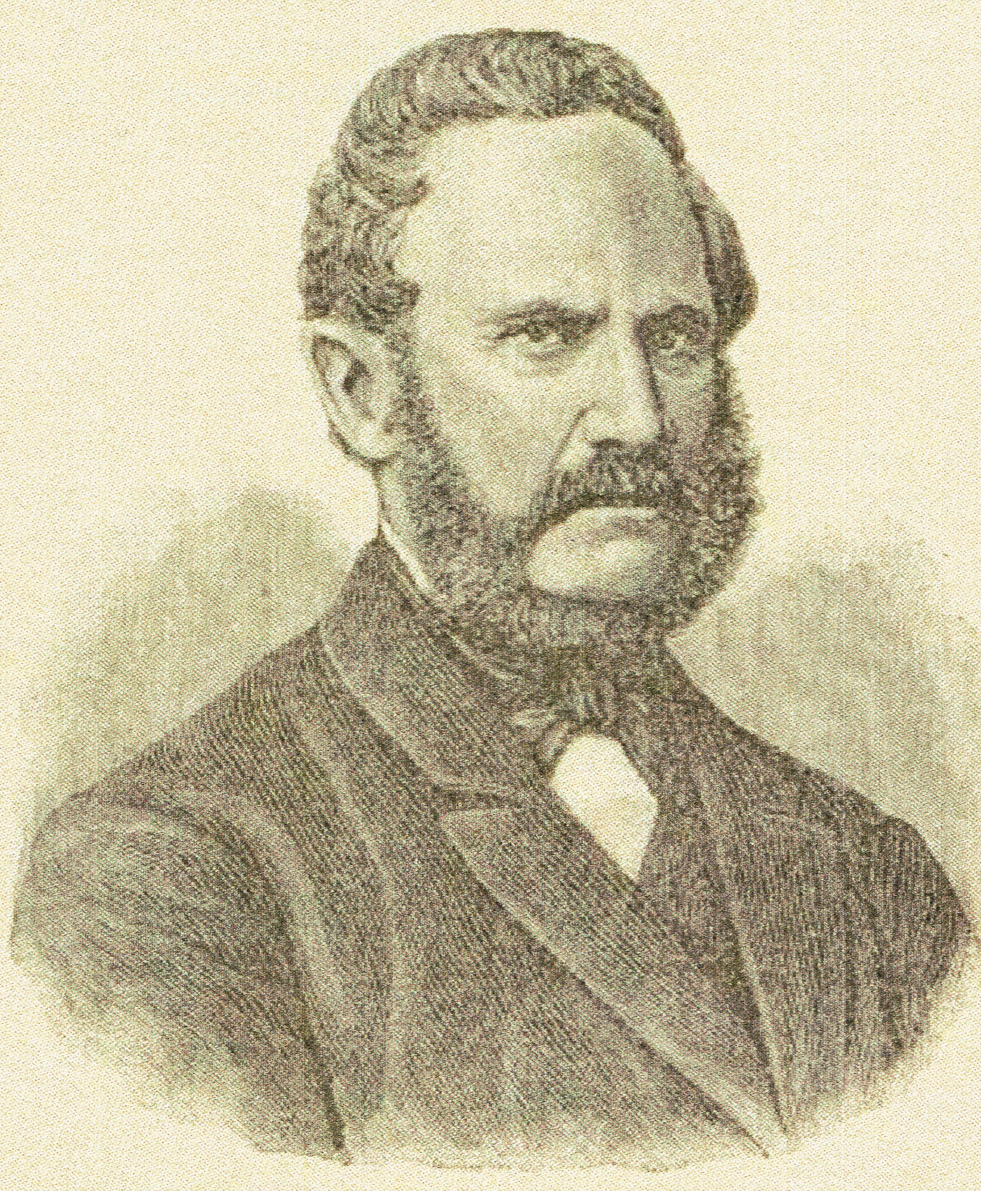 Eduard Groos (1806-1891), Zeichnung eines unbek. Künstlers aus dem Buch von F. Groos: "Als der Großvater die Großmutter nahm". Marburg 1895. Scan von Dieter Bald